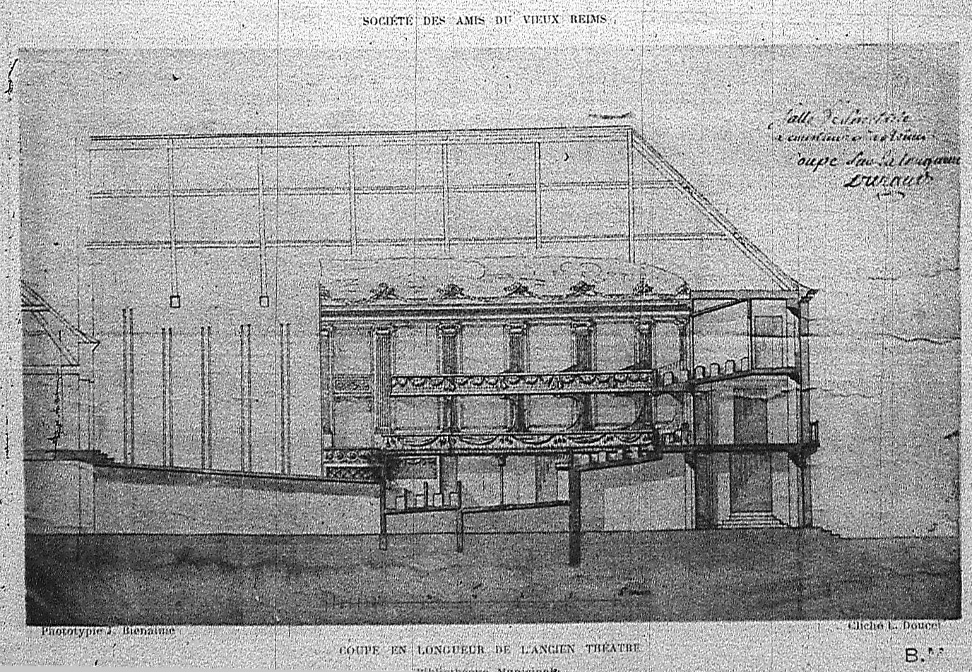 Theatre de reims en coupe plan Durand.